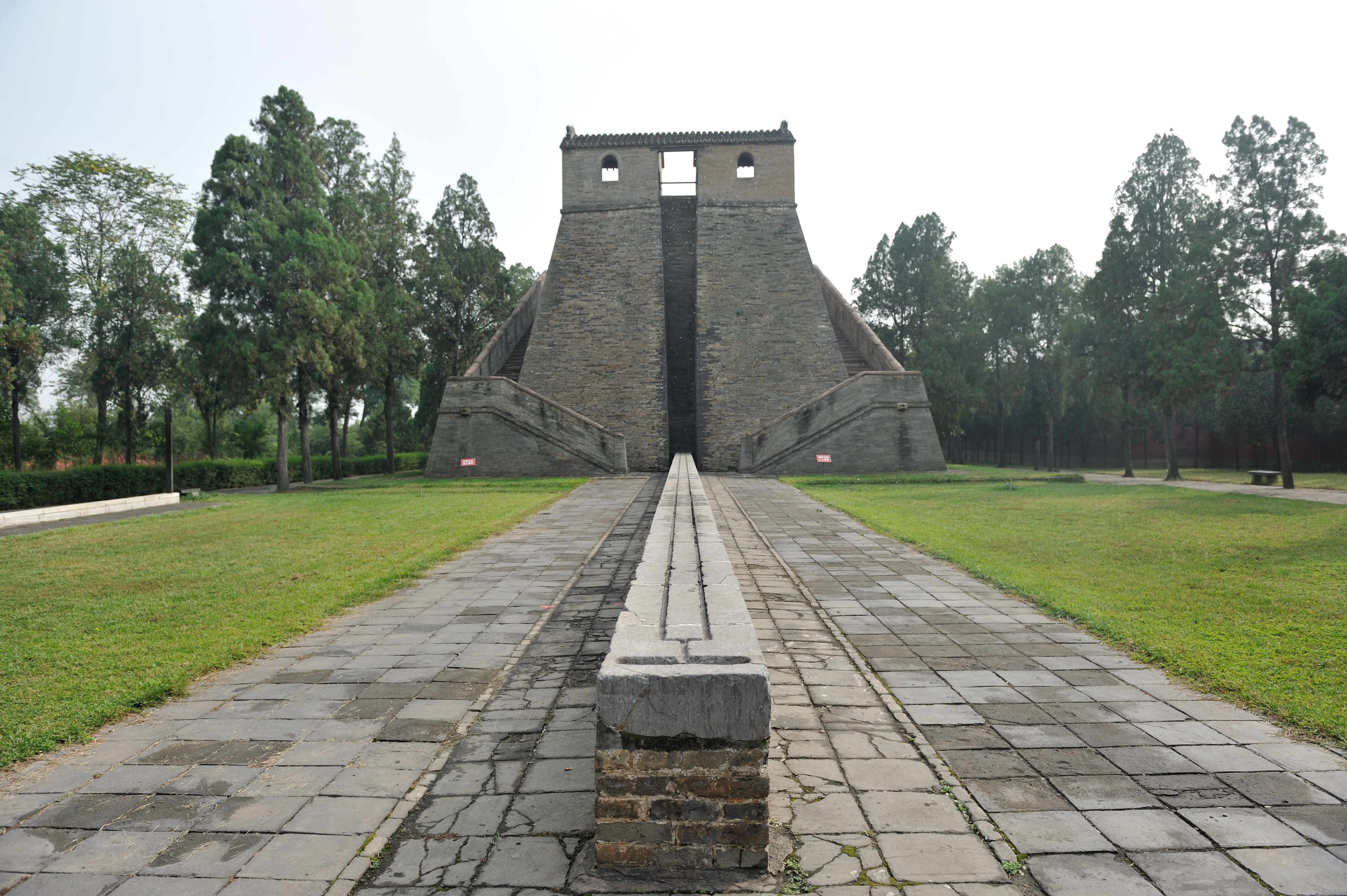 登封观星台